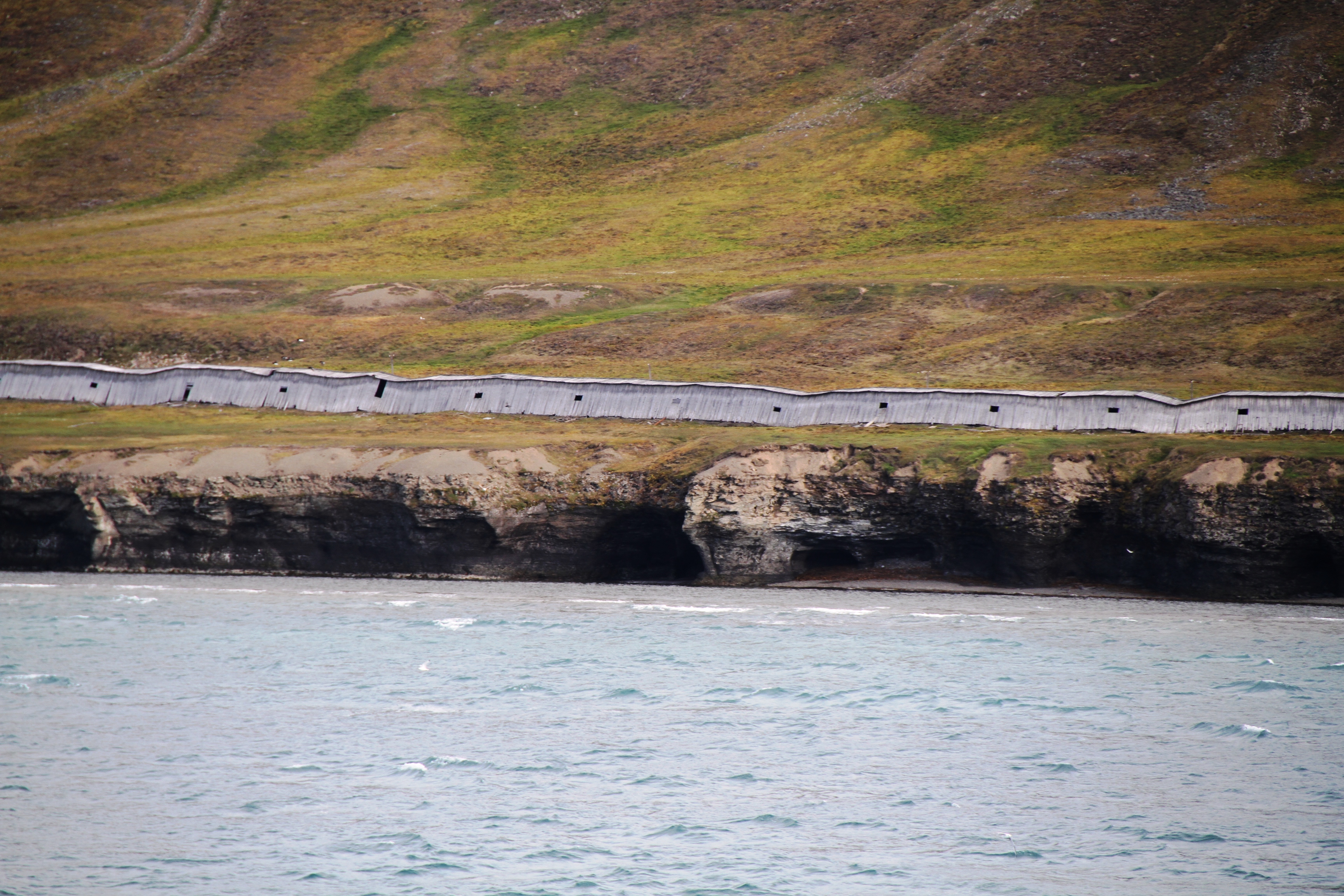 Coles Bay 20th century coal mining settlement, Svalbard. Railroad facility between Coles Bay harbour and Grumant mines.